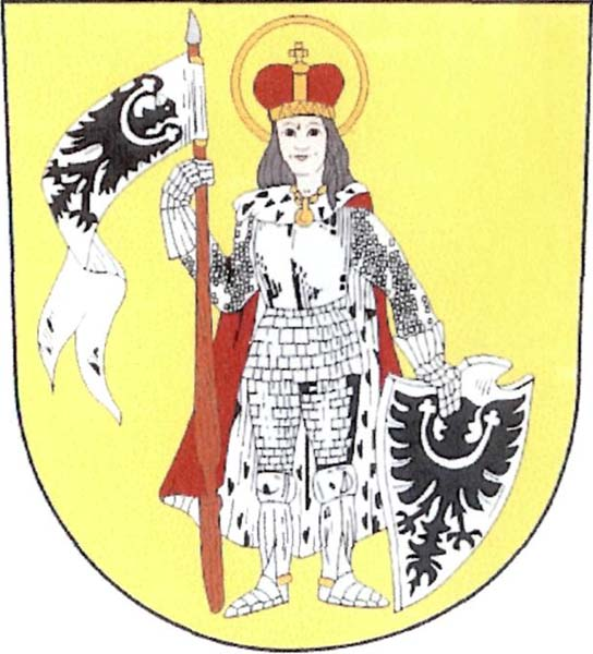 Znak obce Levín (okres Litoměřice)